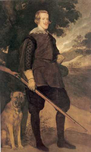 Copia de taller del Felip IV caçador de Velázquez